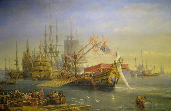 L'embarquement de Jacques II pour l'Irlande (école française du XVIIIe, Enterrez Art Gallery, Museum & Archives )